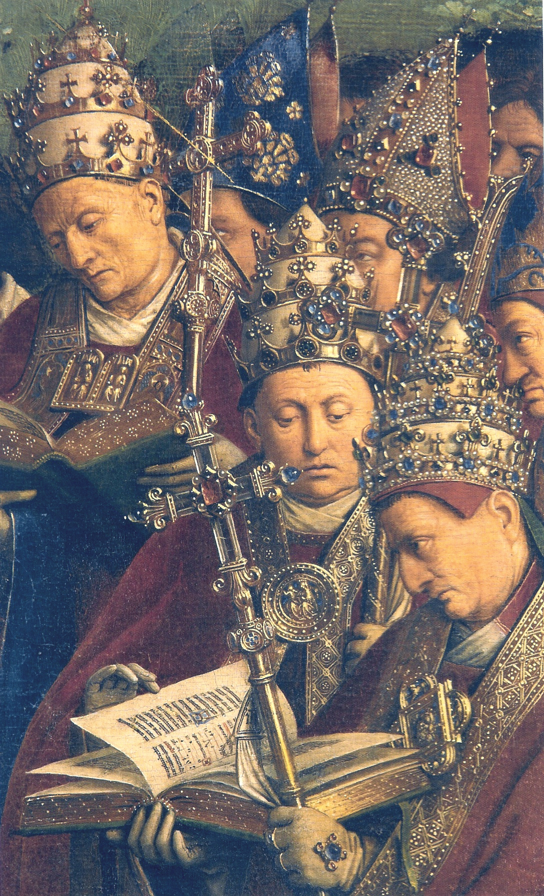 detail: popes